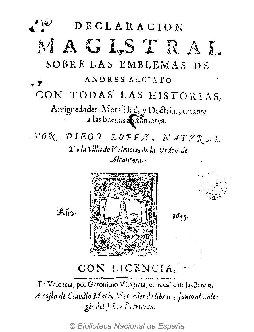 Título: Declaracion magistral sobre las emblemas de Adres Alciato: con todas las historias, antiguedades, moralidades, y doctrina, tocante a las buenas constumbres Autor: López, Diego Editor: Geronimo Vilagrasa ... Fecha de publicación: 1655